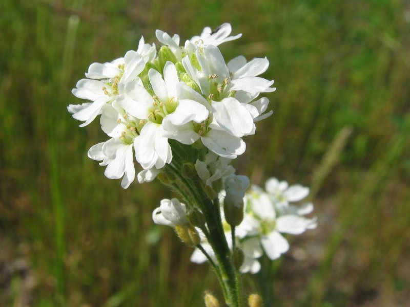 Gewöhnliche Grauskresse Berteroa incana, Zingst